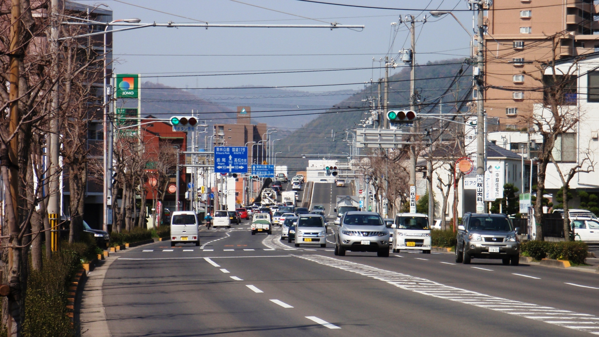 香川県高松市にある市道室町新田線の起点付近。左の緑の看板「JOMO」より手前（東側）が当市道で、奥（西側）は香川県道10号高松長尾大内線別線。